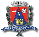 Brasão do município de Tambaú, estado de São Paulo, Brasil.